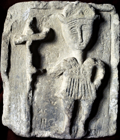 Relieve prerrománico de Luesia (hacia 970) que representa a un rey dispuesto para entrar en batalla sosteniendo la Cruz litúrgica o procesional, llamada en la tradición asturiana, Cruz de la Victoria.